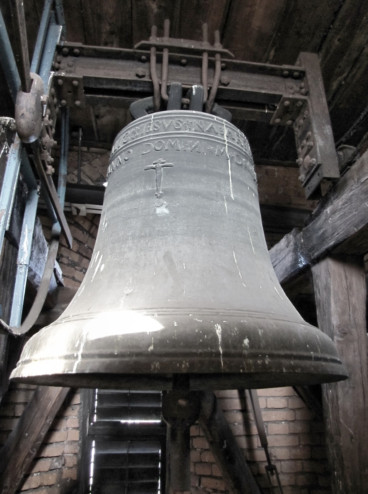 Dzwon na wieży w kościele św. Stanisława w Starym Bielsku (Bielsko-Biała). Dzwon z 1555 roku ozdobiony blisko dolnego brzegu płaszcza delikatnym ornamentem roślinnym i datą MDLV, wyżej drobnych wymiarów odlewem Chrystusa na krzyżu, u góry zaś napisem o rozdzielnikach kształtu lilii heraldycznej: TITULUS TRUMFALIS JESUS NAZARENUS REX JUDEORUM